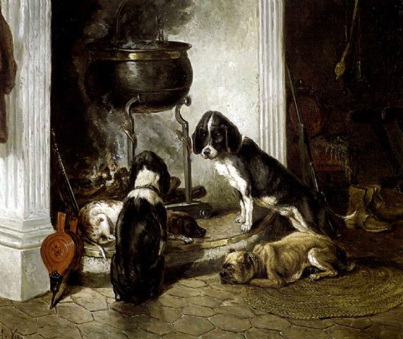 Le repos apres la chasse